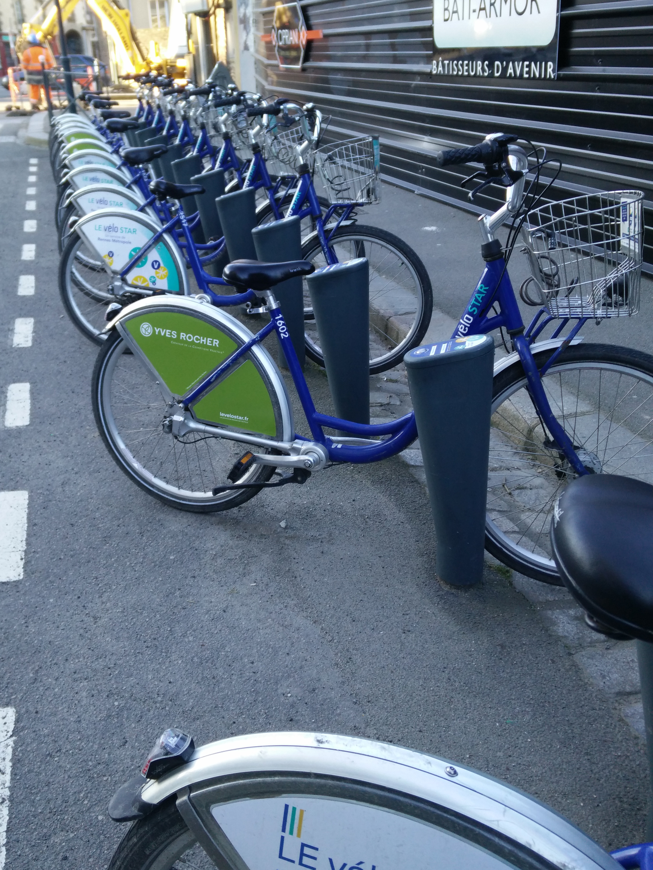 Vélo en libre service, affichant une publicité Yves Rocher